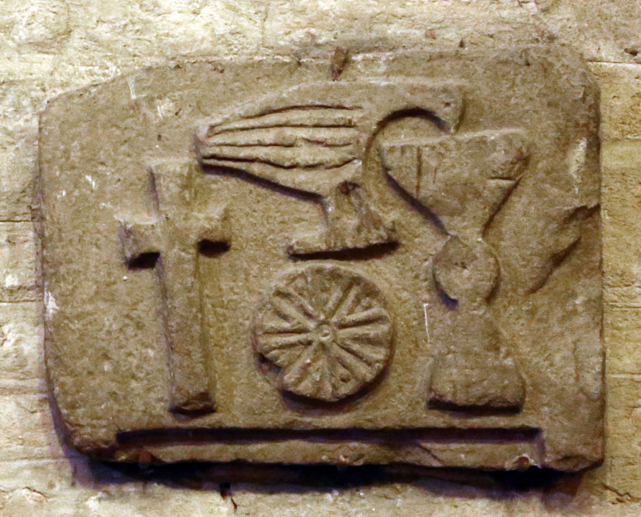 abbazia di San Mercuriale This is a photo of a monument which is part of cultural heritage of Italy.